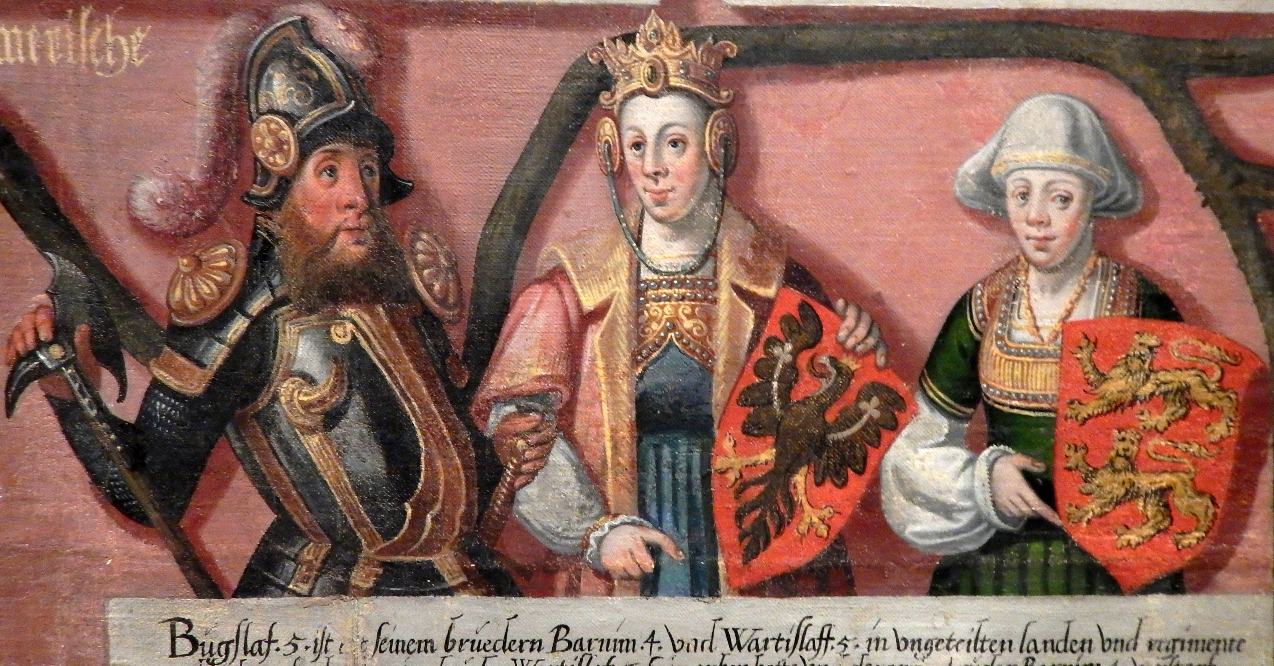 Bogislaw V. von Pommern mit seinen Gemahlinnen Elisabeth von Polen und Adelheid von Braunschweig.